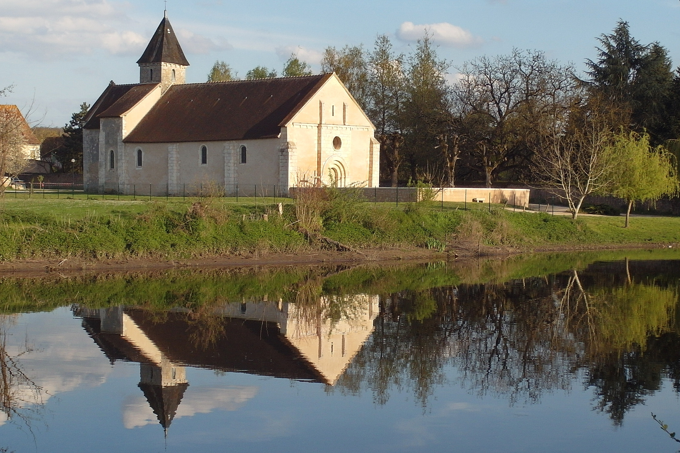 Commune de Saint-Germain 86. Eglise de Saint-Germain d'origine romane, édifiée au XIIe siècle sur la rive droite de la Gartempe. Abside demi-circulaire et clocher carré à modillons de l'époque. Très belles peintures murales dont des peintures en grisaille.La façade occidentale est inscrite à l'inventaire des monuments historiques.